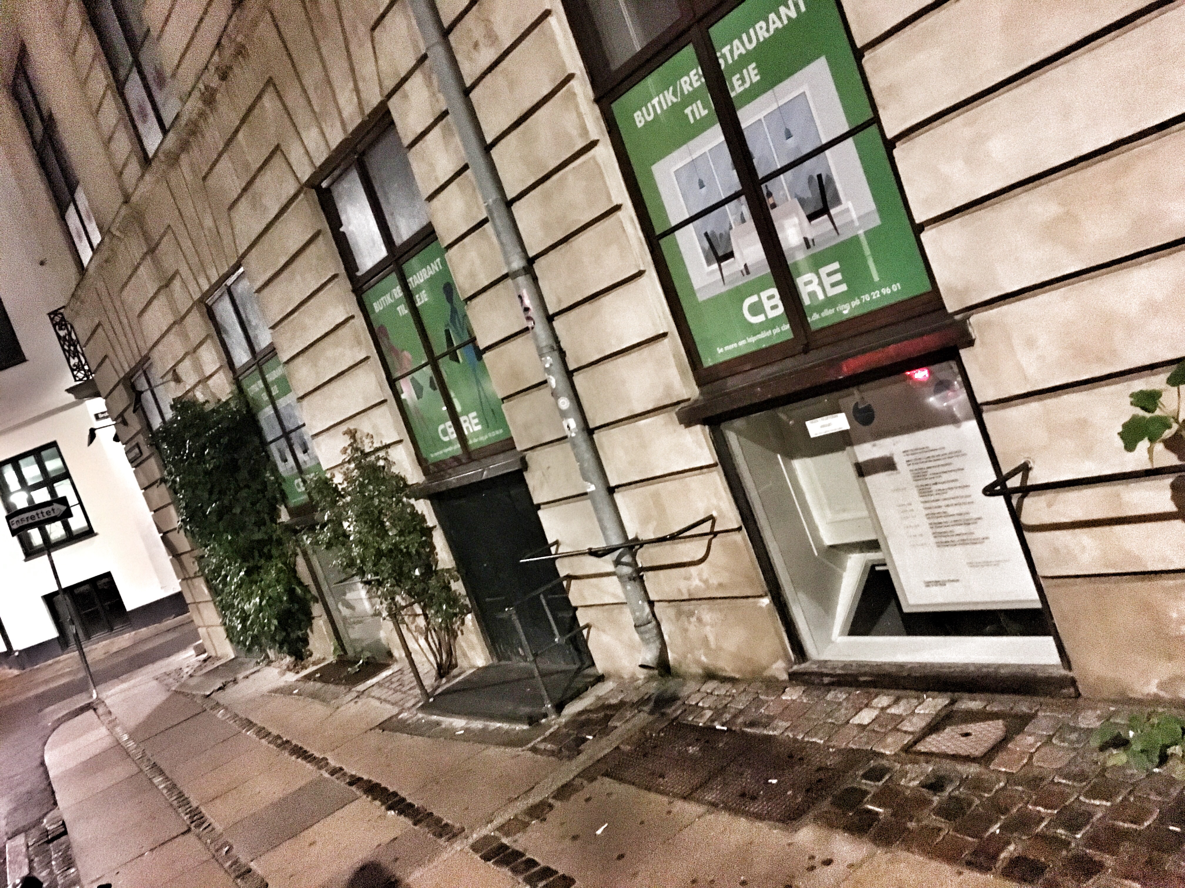 Posthus Teatret, Rådhusstræde, København